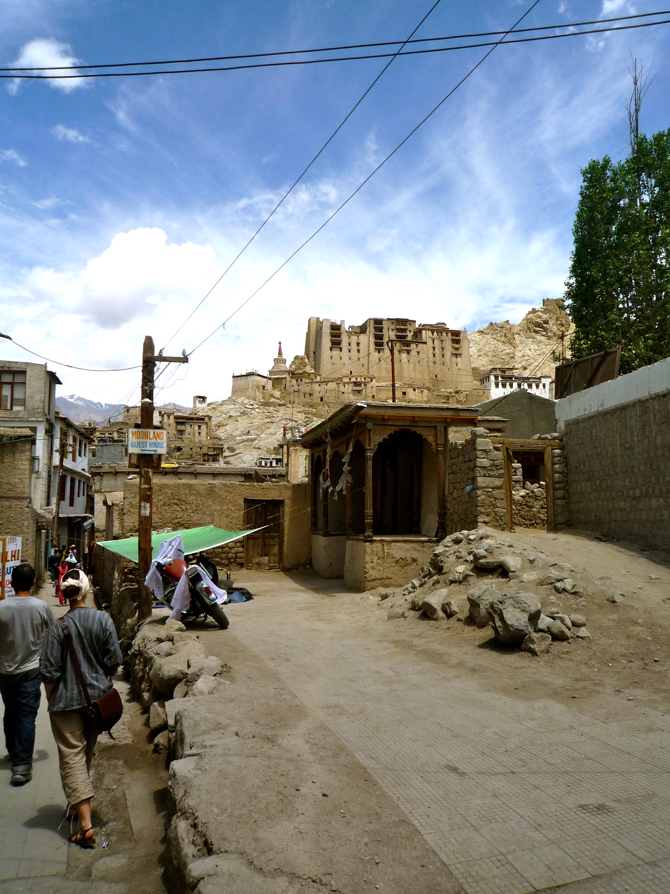 Le palais de Leh fondé au XVIIème siècle par Sengue Namgyal